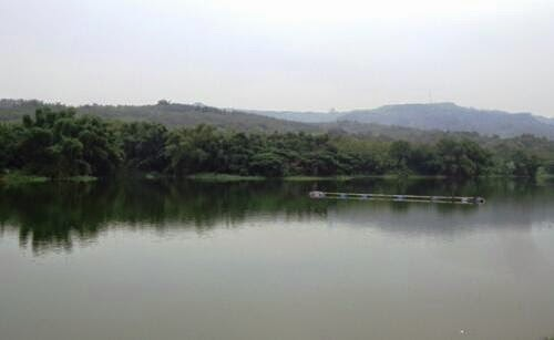 Pemandangan Waduk Tempuran